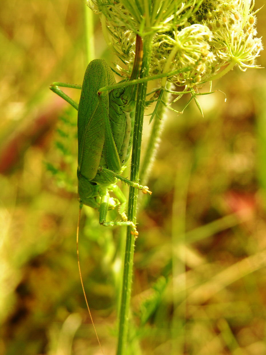 Žiogas giesmininkas (Tettigonia cantans) Šeima. Žiogai (Tettigoniidae) Foto: Algirdas, 2006 m. liepos 25 d., Lietuva